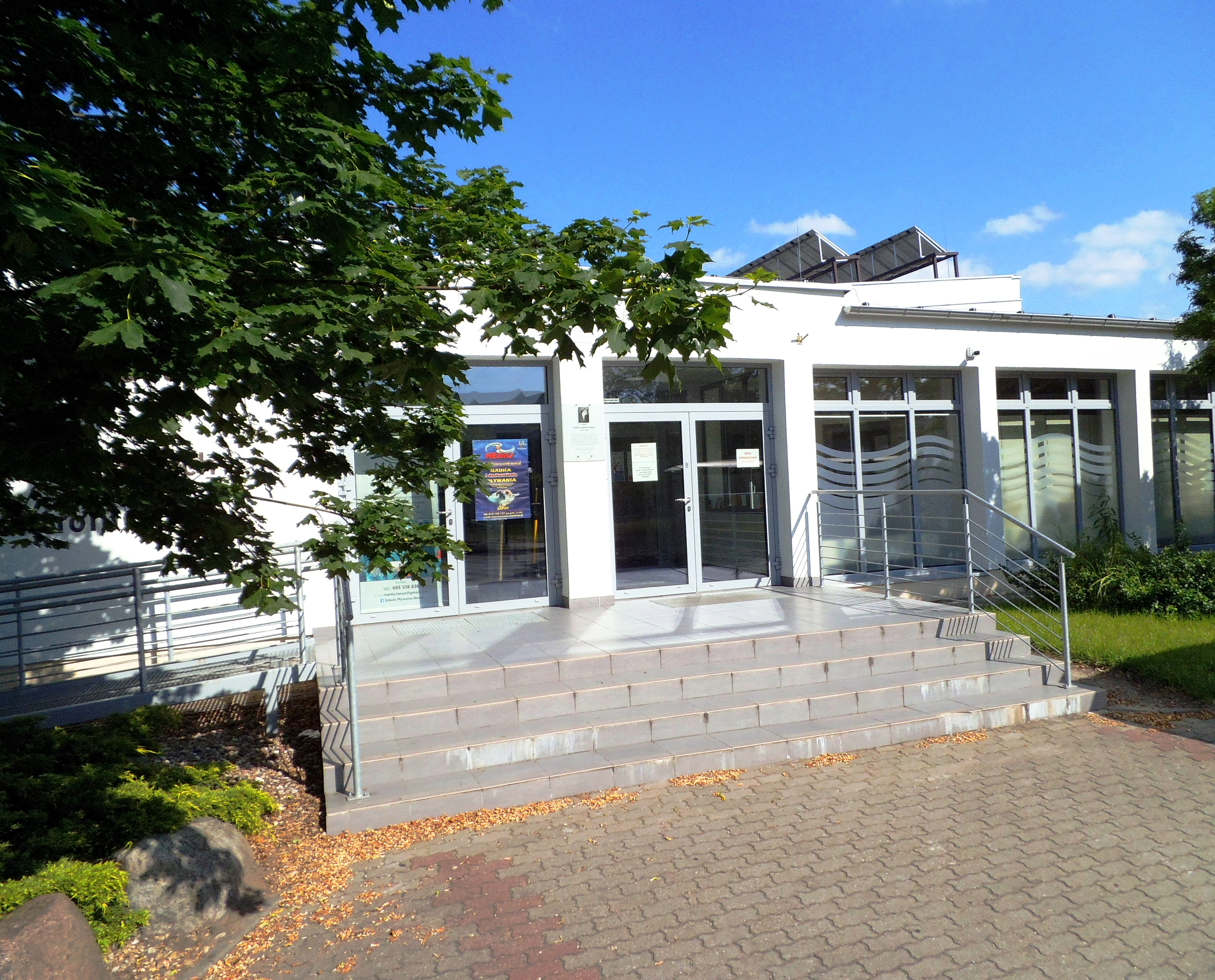 Pływalnia ZSMEiE w Toruniu